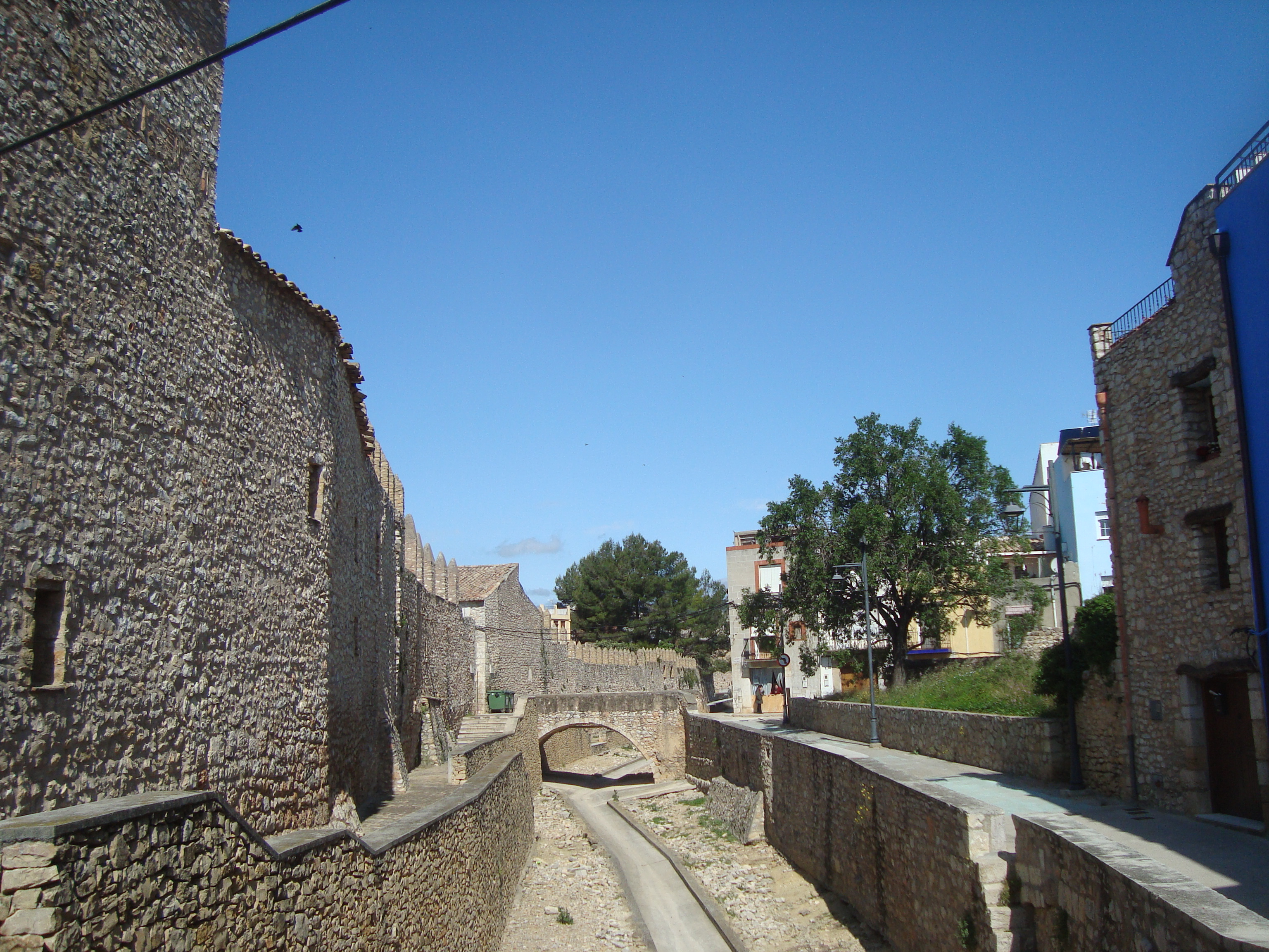 Muralles (Sant Mateu)